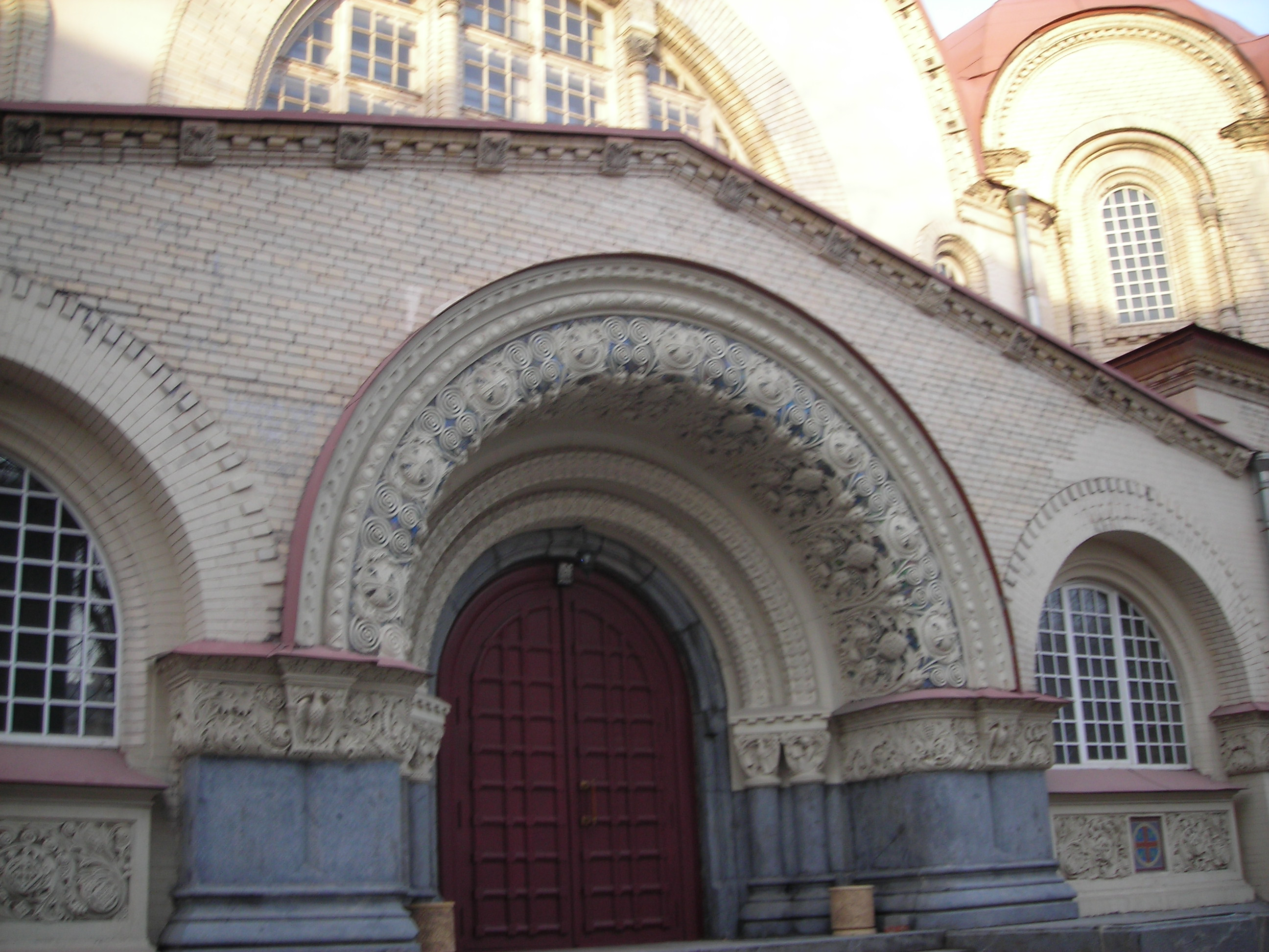 Kazan church in Voskresensky Novodevichy monastery (entrance)